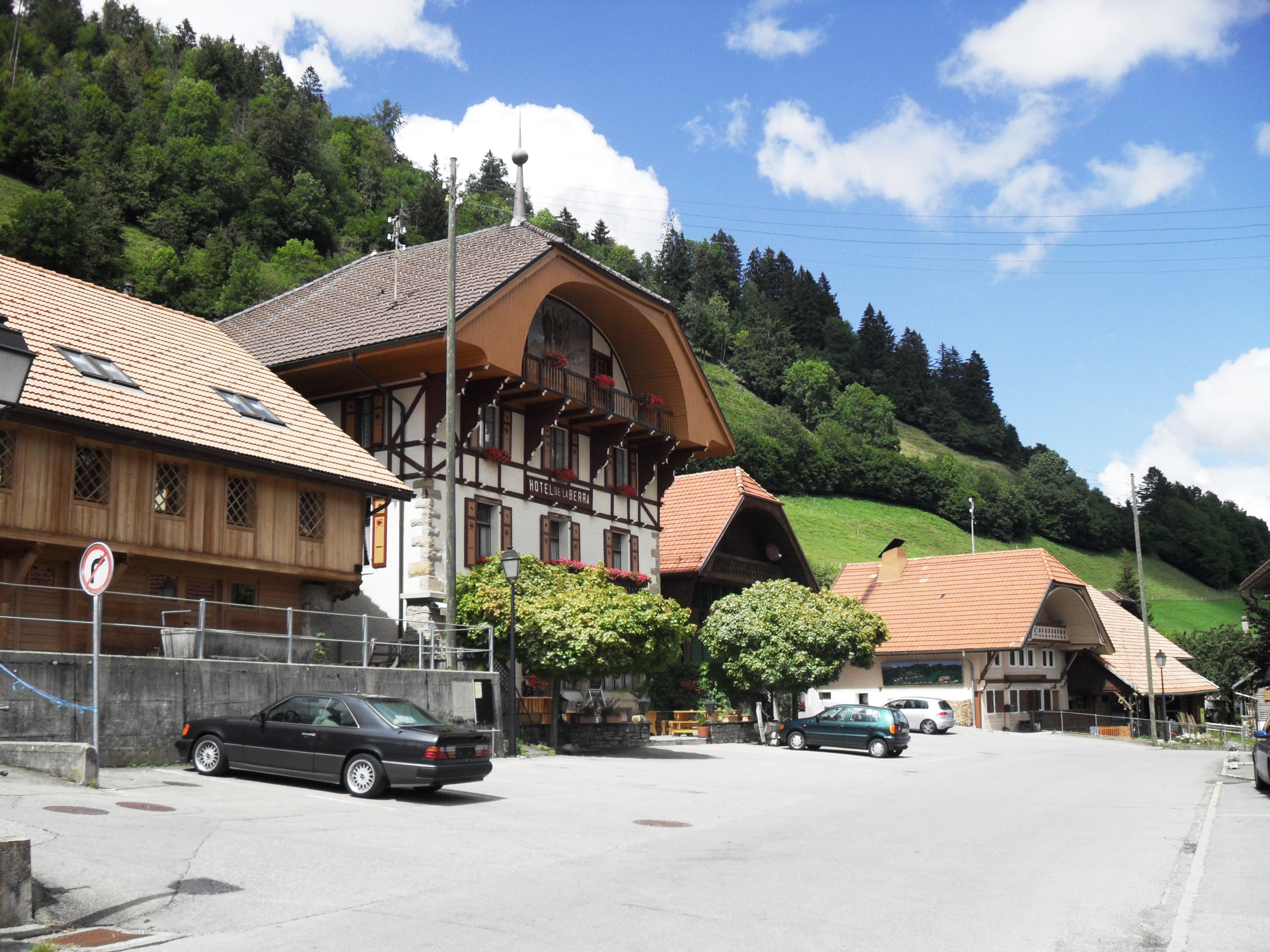 Café Restaurant "La Berra" à Cerniat Object location46° 38′ 03.66″ N, 7° 09′ 32.54″ E